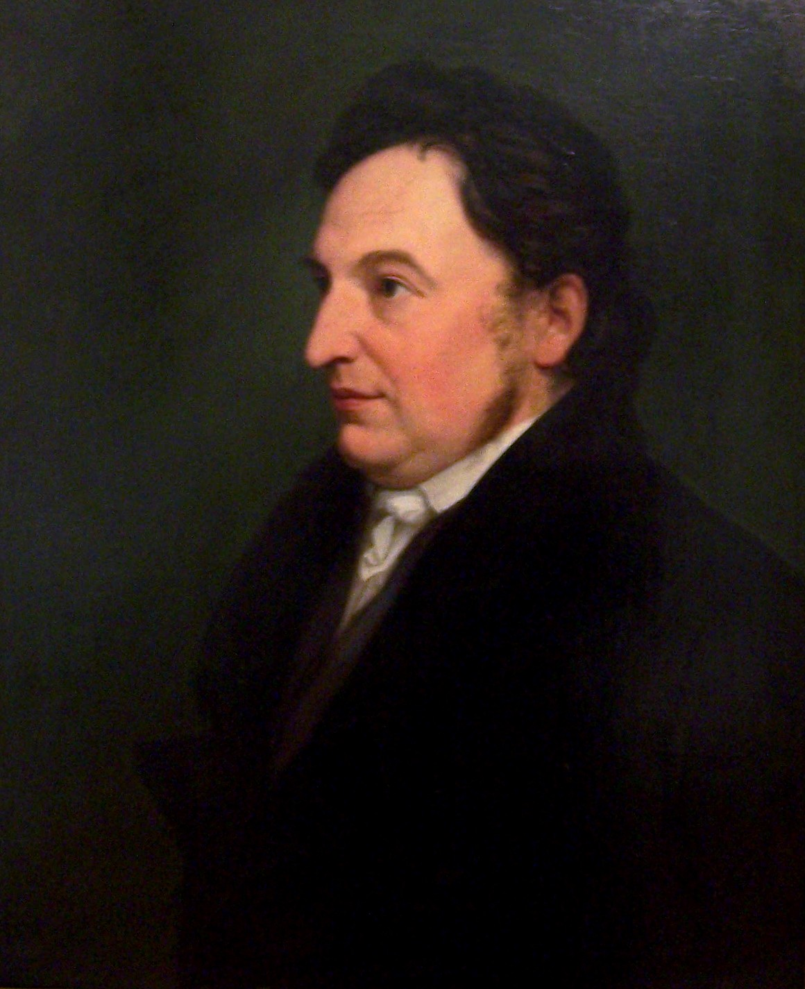 Bildnis Johann Gottlob von Quandt (1787-1859).Abzüge in der Qualität sind durch das Fotografieren ohne Blitz (anderes war nicht erlaubt) in abgedunkelten Räumen zu erklären.